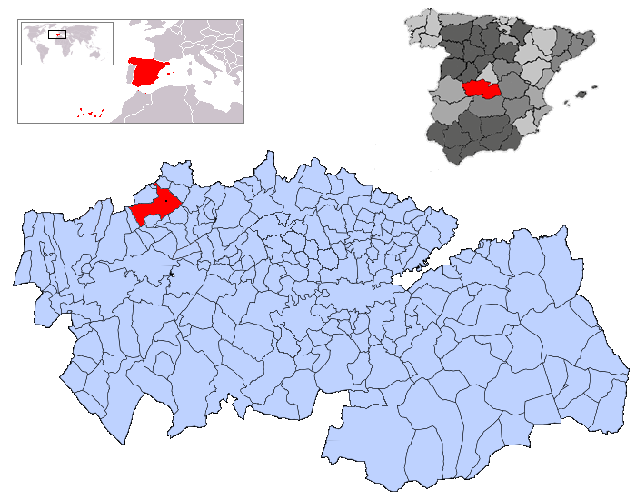 Navamorcuende en la provincia de Toledo